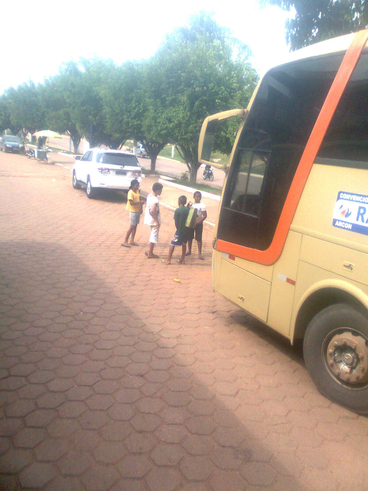 Crianças trabalhando no terminal rodoviário de Goianésia do Pará